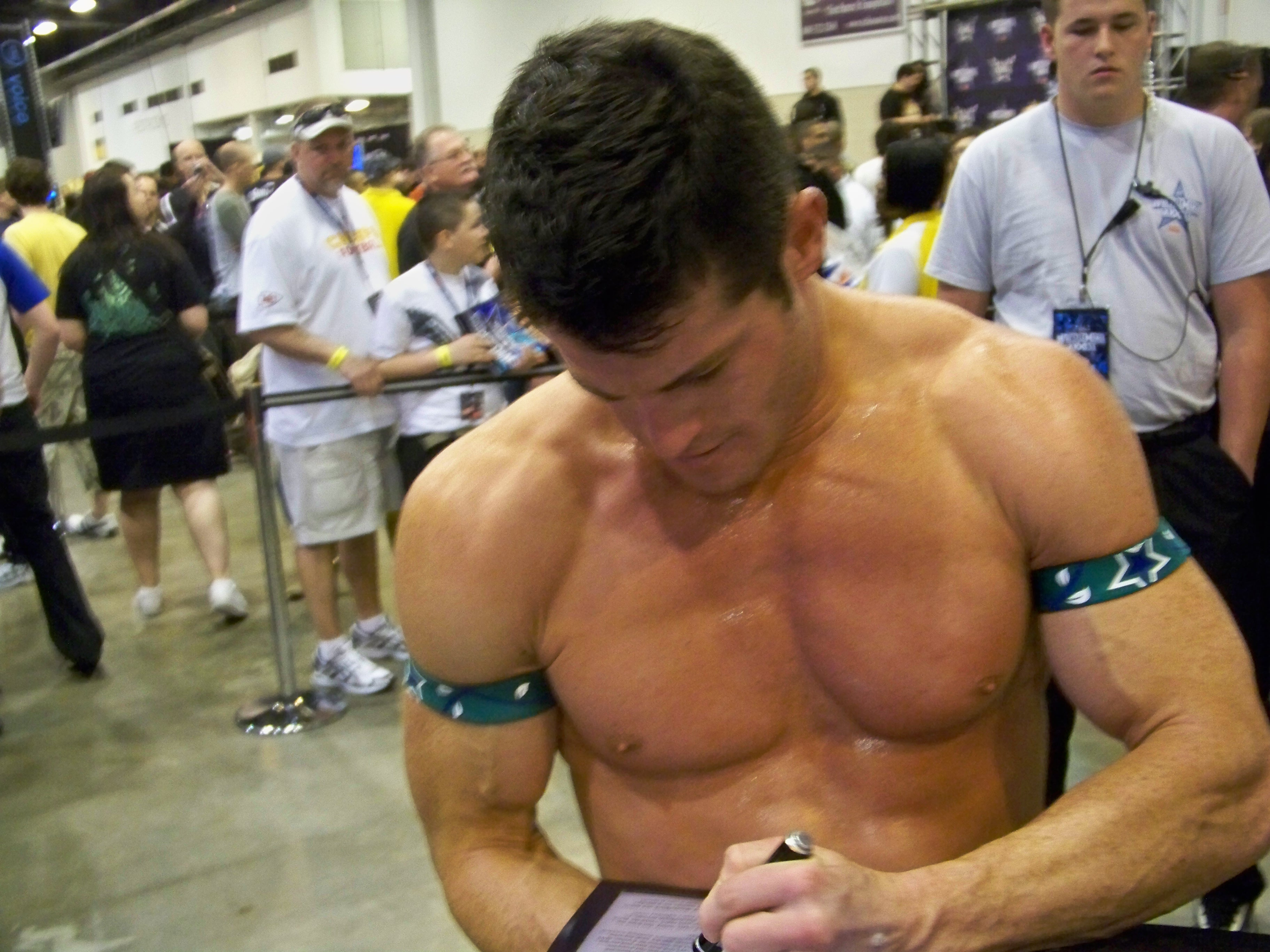 Il était en train de signer le programme de WM du Joe et s'est excusé de mettre de la transpiration partout.